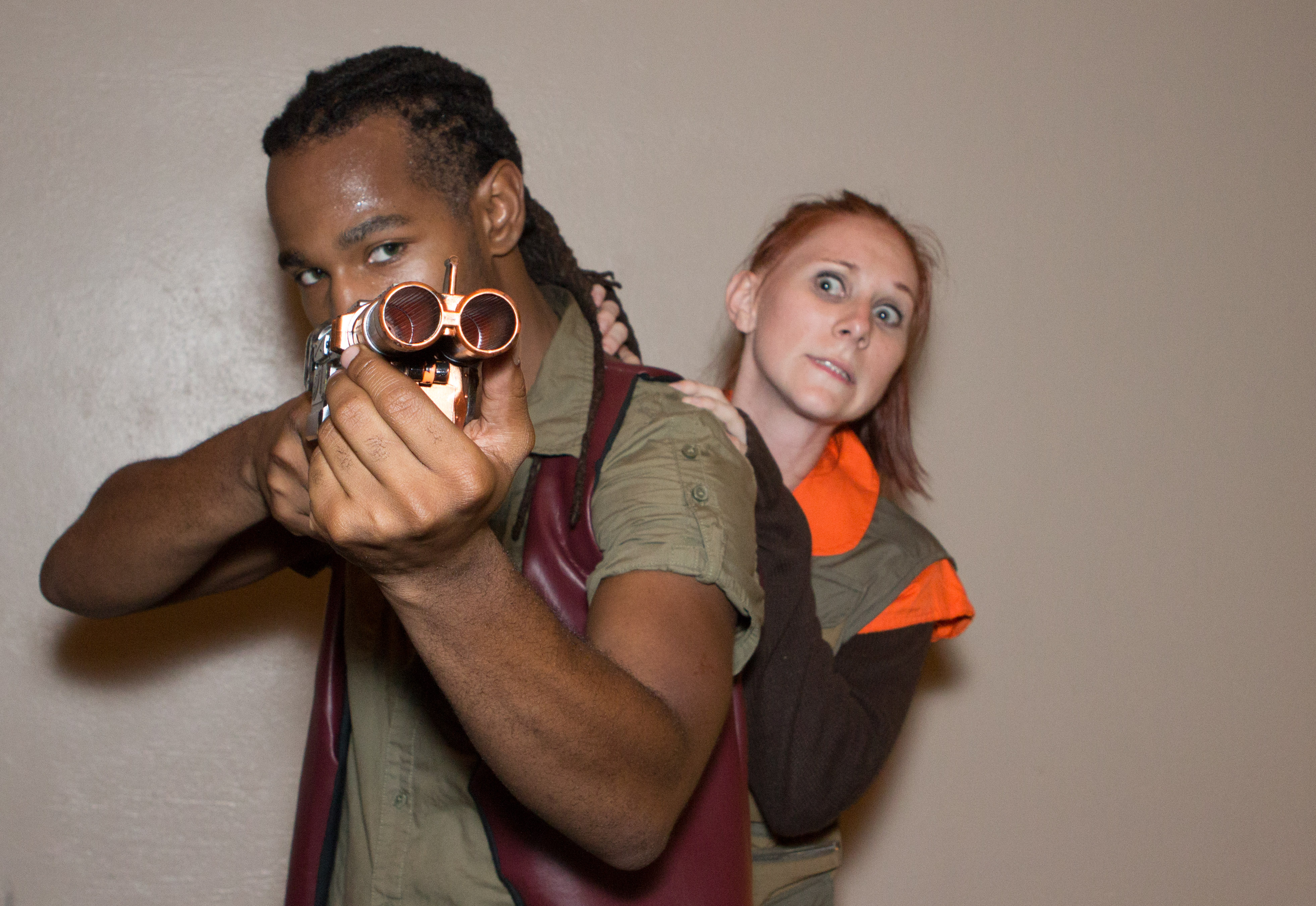 Cosplay at Dragon*Con 2013.